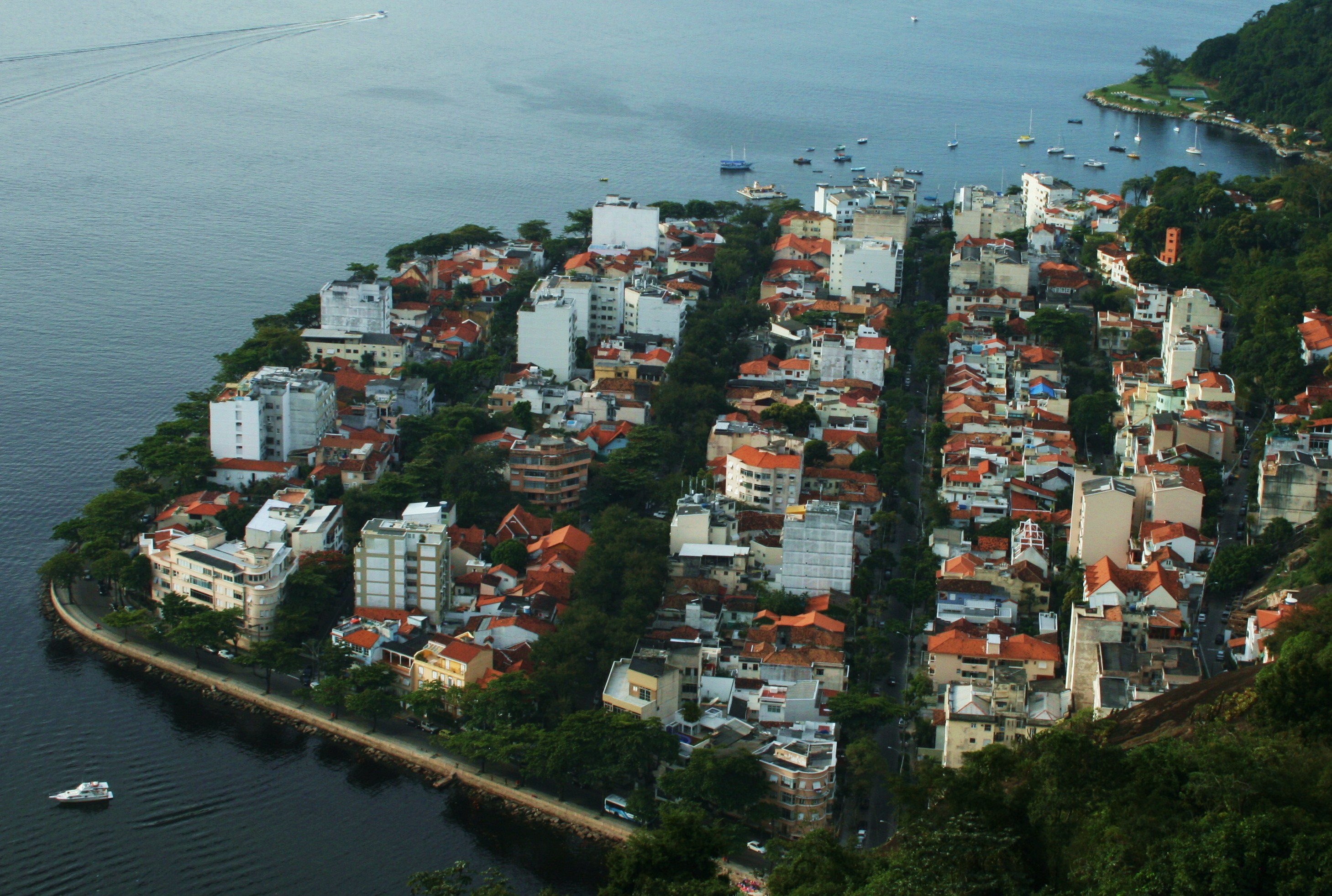 Il quartiere residenziale di Urca a Rio de Janeiro